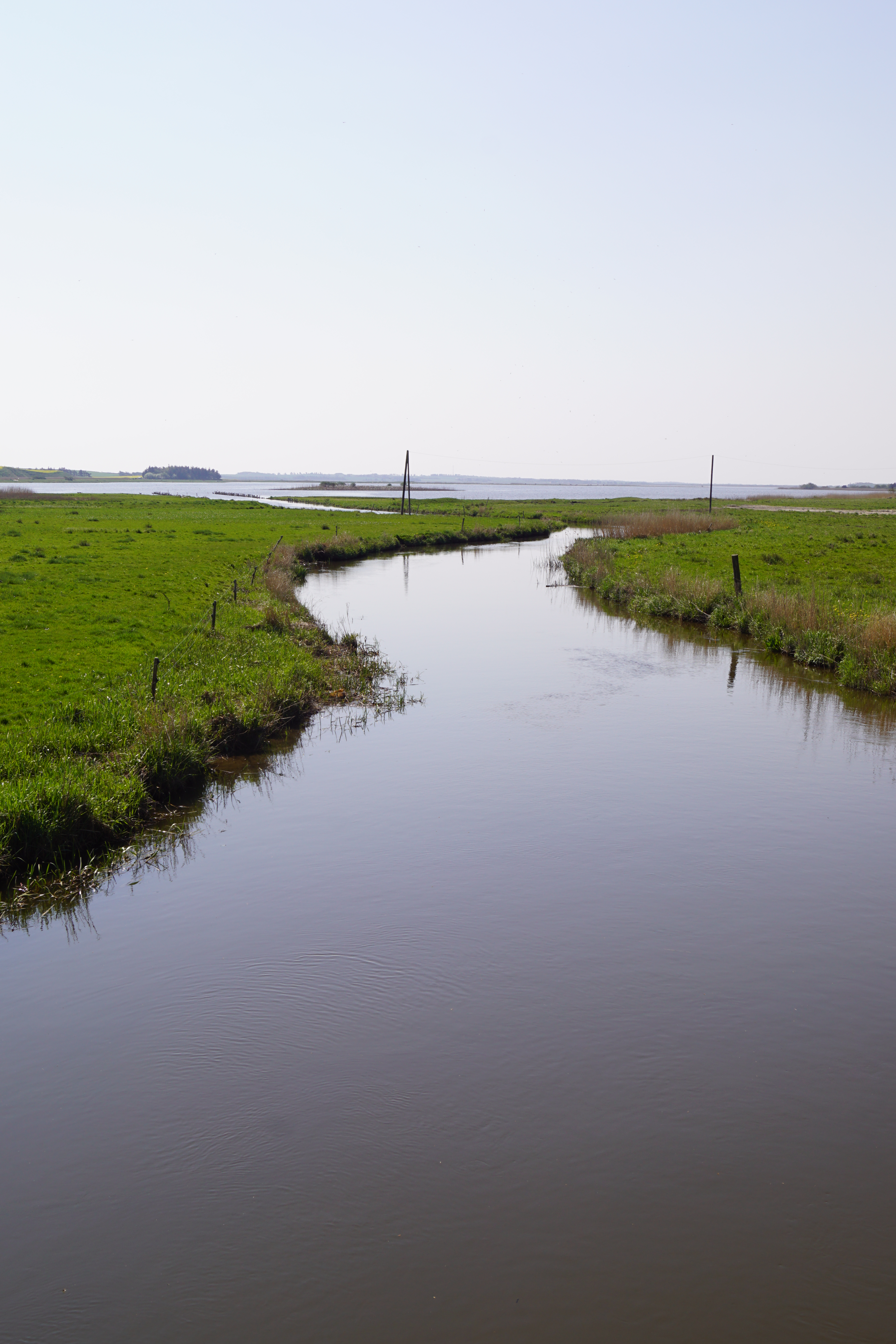 Hvidbjerg Ås udløb i Ørum Sø